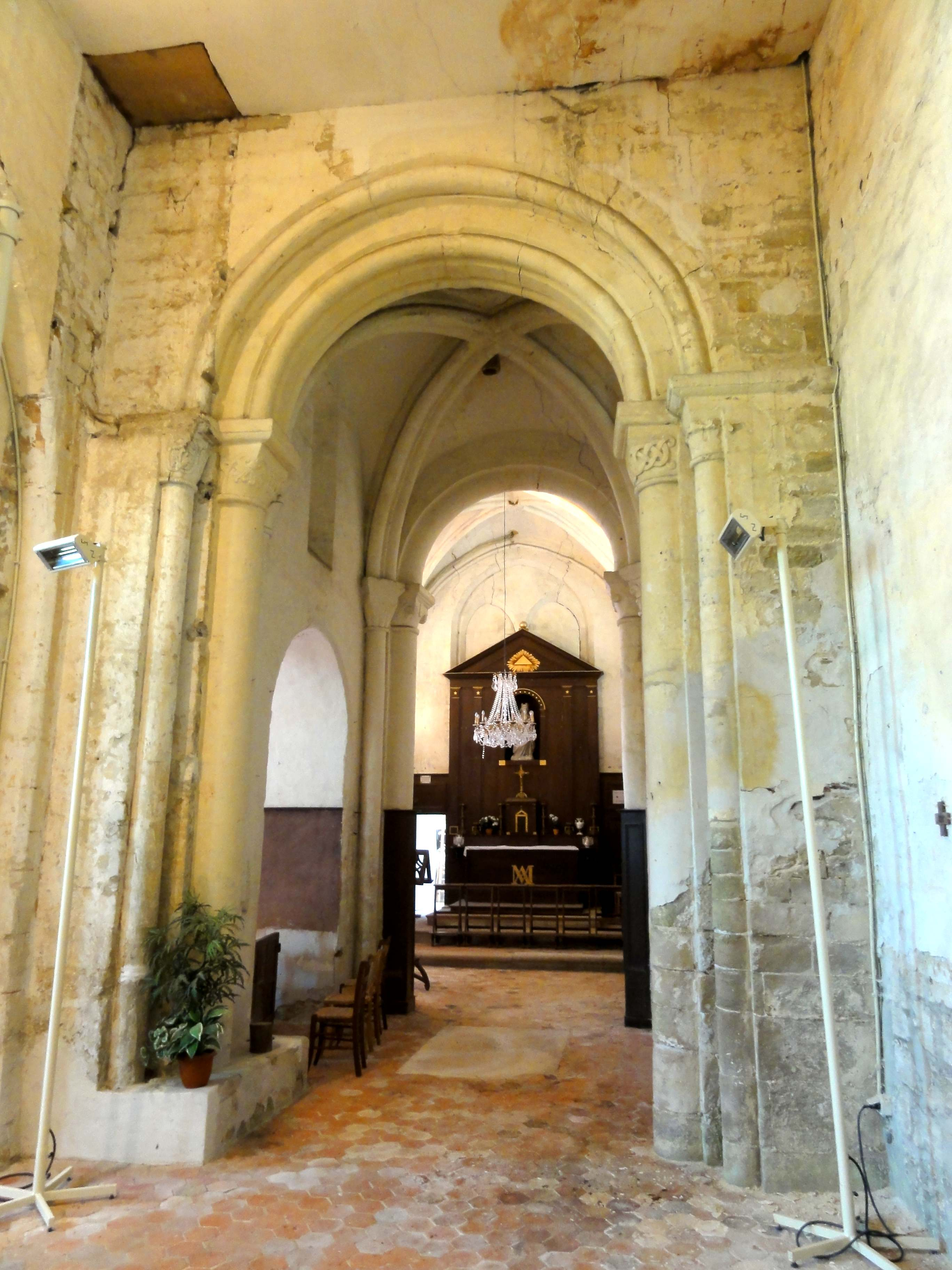 Intérieur de l'église - voir titre.